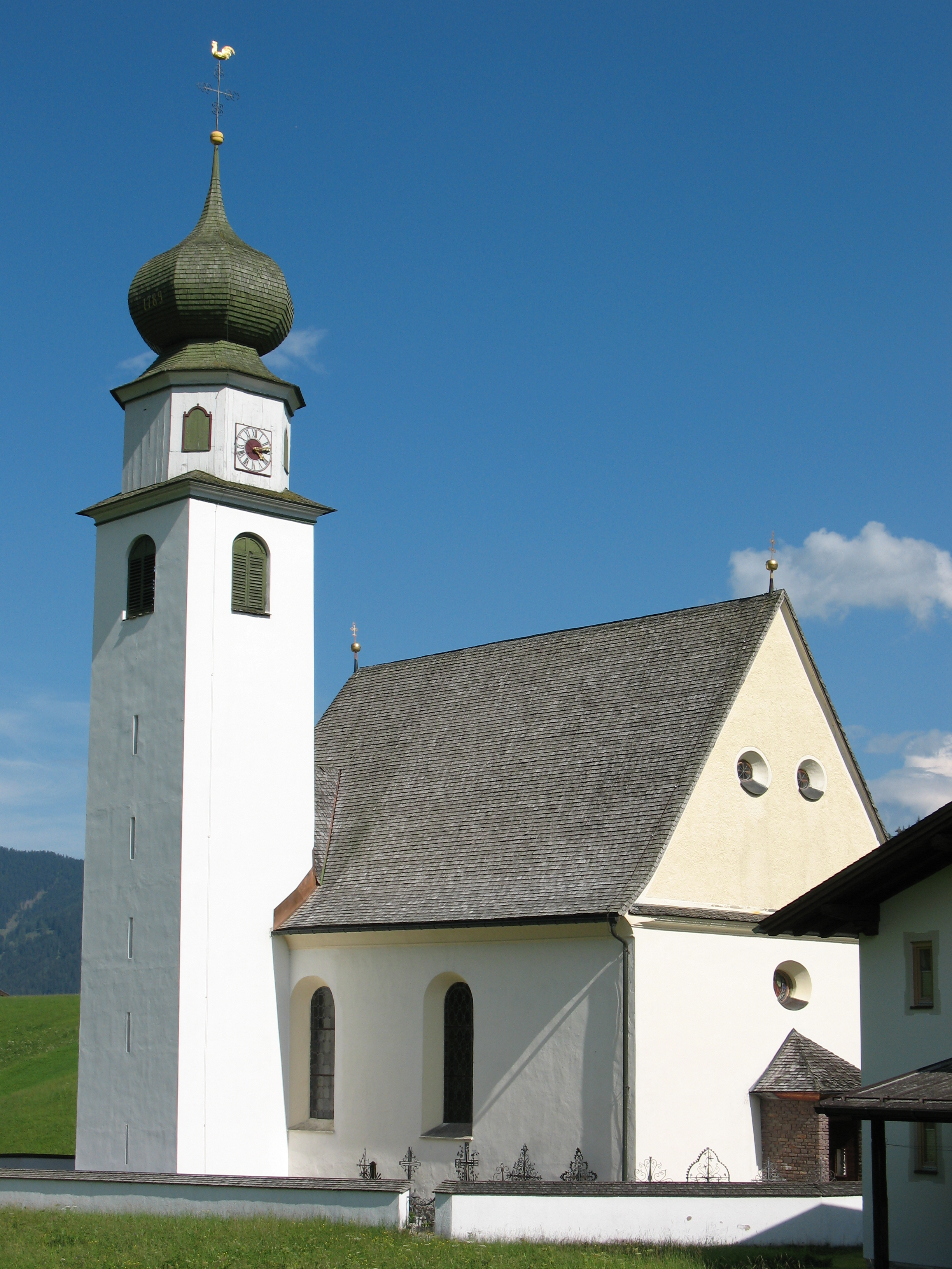 Kath. Pfarrkirche hl. Michael und Friedhof mit Kapelle